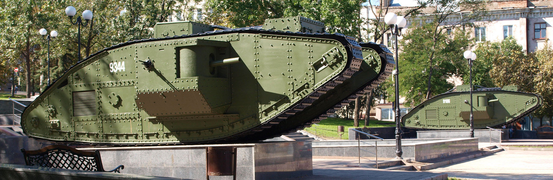 Англійські танки Mark V (Луганськ)